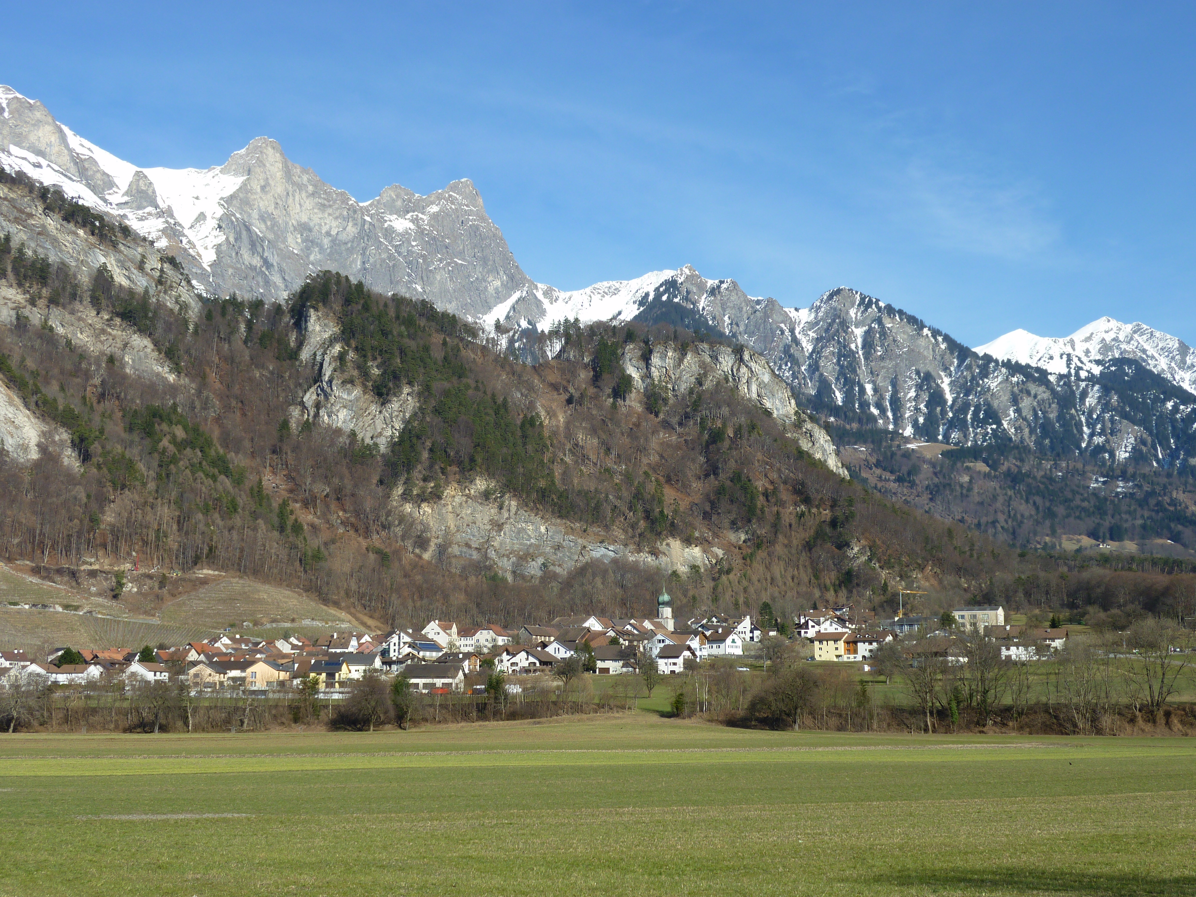 reformierte Kirche von Fläsch